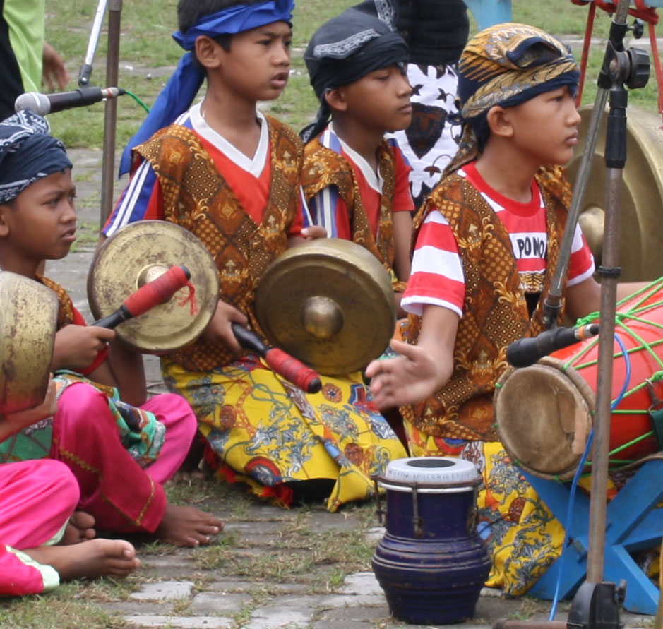 Kelompok penabuh barongan yang terdiri dari anak-anak di Jawa Tengah Indonesia